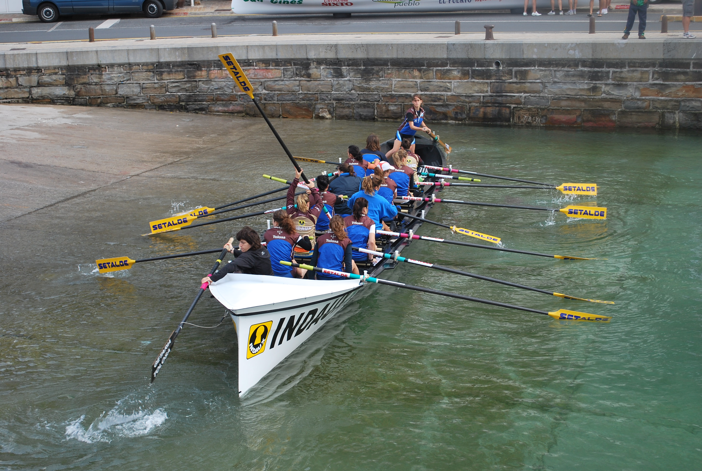 Embarquement d'un équipage de trainière sur le port de Getaria lors du Drapeau de Zarautz (2010).